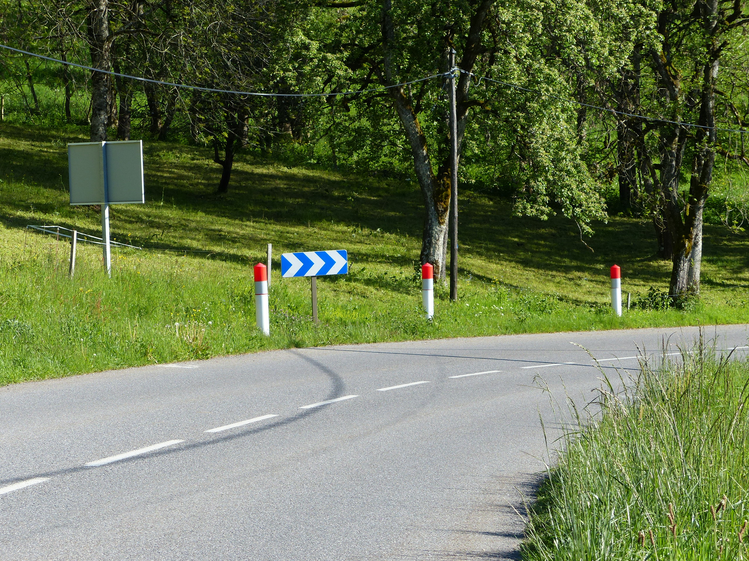 Signalisation routière française J1bis J4, au bord de la D20 en Haute-Savoie